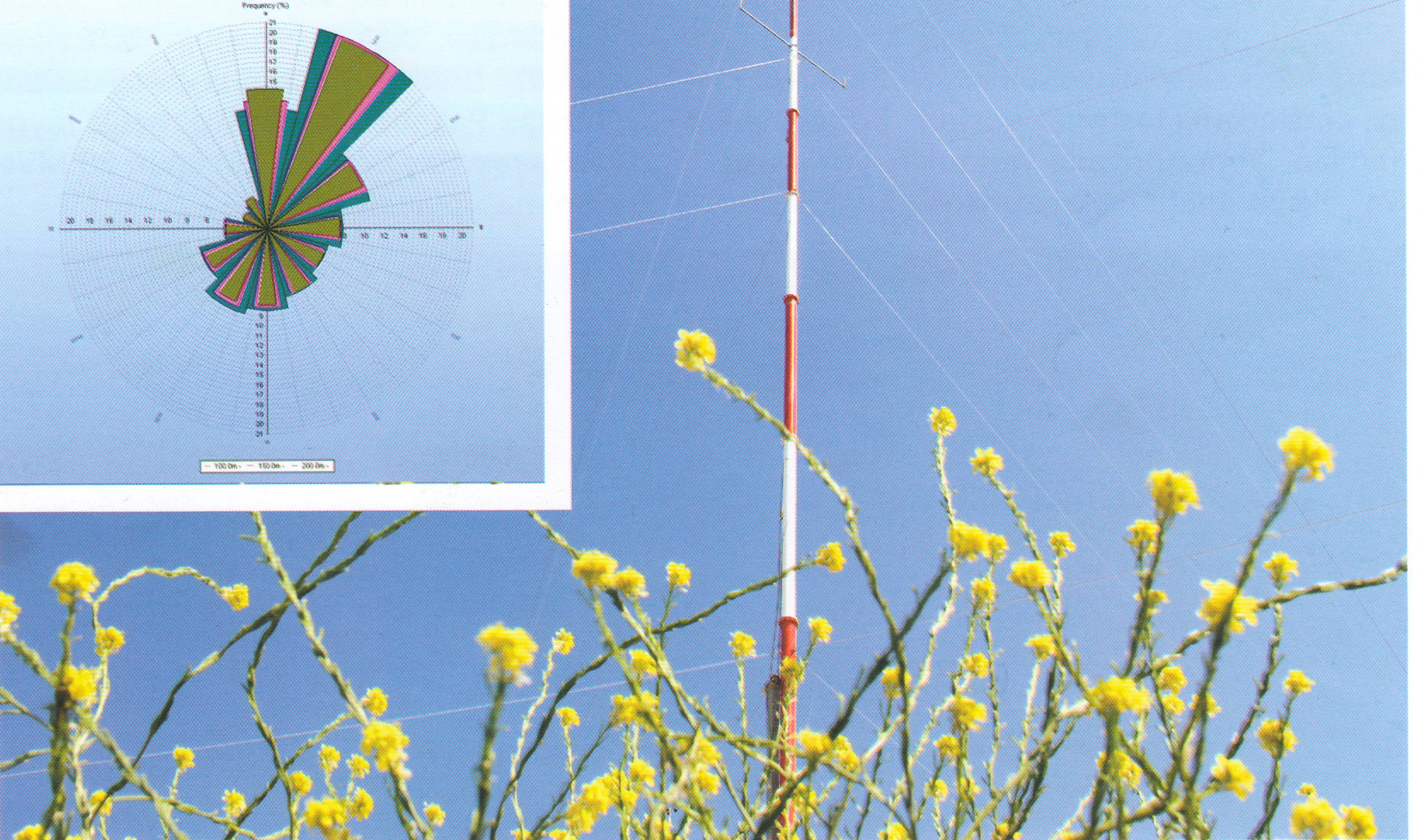 Külək Yel dəyirmanı